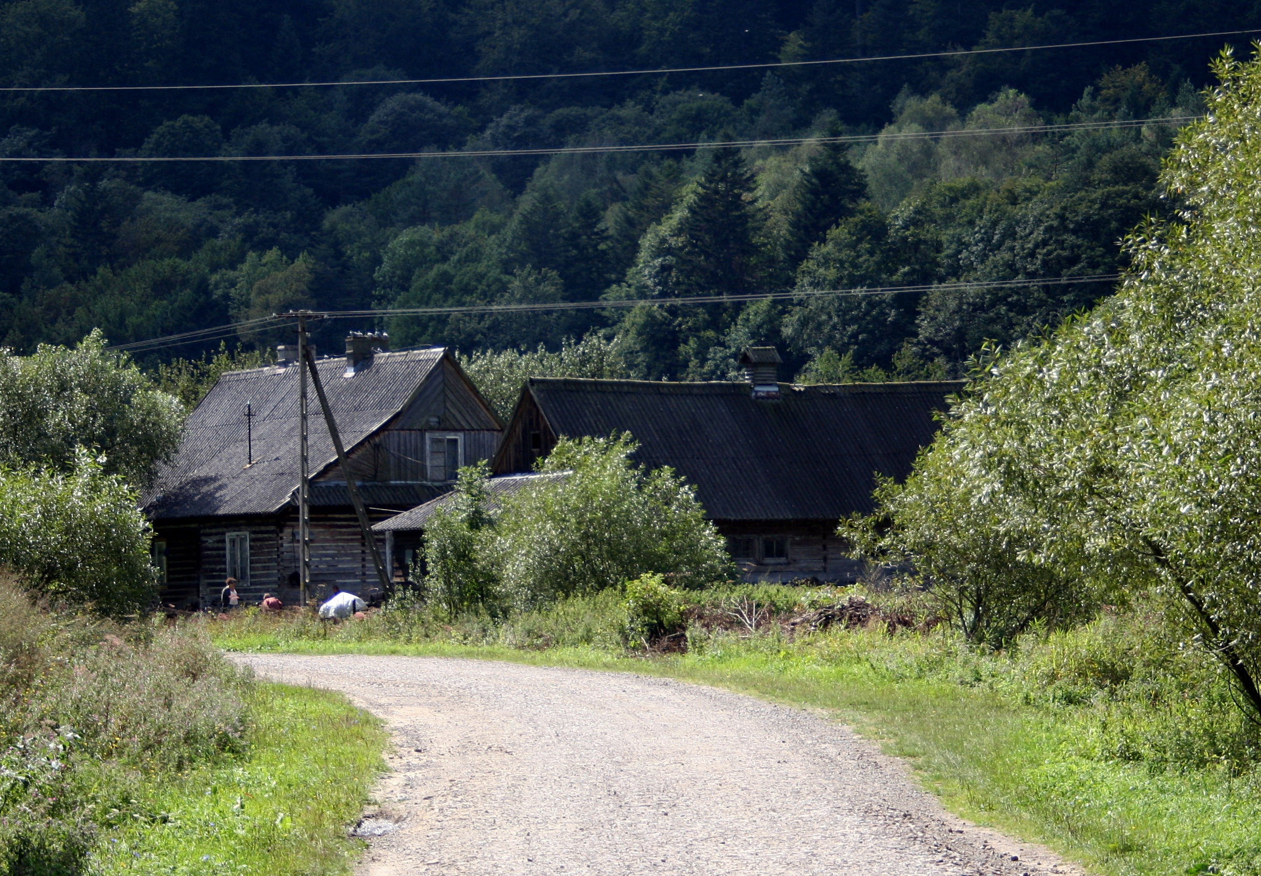 Zabudowania w miejscowości Prełuki, gmina Komańcza, woj. podkarpackie